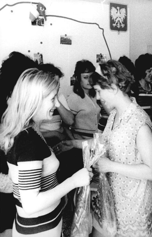 Chemnitz, polnische Gastarbeiterin ADN-ZB Thieme 22-7-74 Karl-Marx-Platz: Polnische Arbeiter werden zum Jahrestag der Volksrepublik beglückwünscht- Herzlich beglückwünschten Kollegen aus der DDR ihre polnischen Freunde im VEB Baumwollspinnerei Karl-Marx-Stadt zum 30. Jahrestag der VR Polen. Herzlich gratuliert Vertrauensmann Helga Krumbholz der polnischen Kollegin Helena Bobrik, die erst kürzlich für ihre gesellschaftliche Arbeit ausgezeichnet wurde.